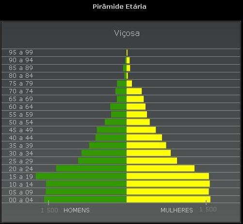 Piramide Etaria de Viçosa-AL